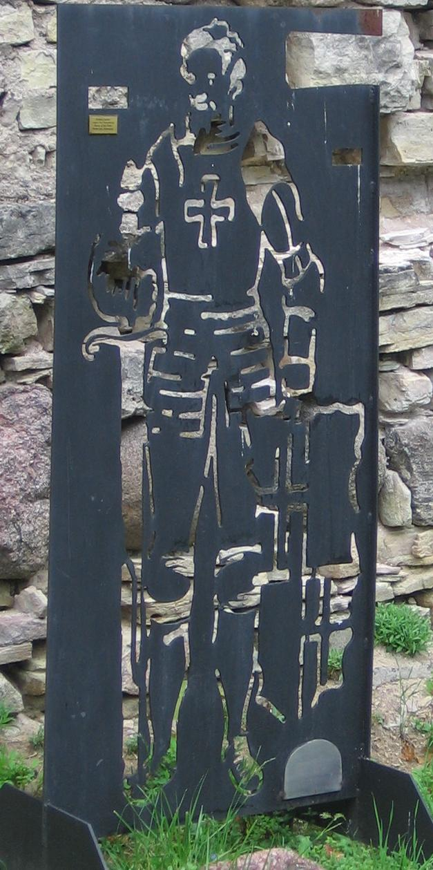 Plettenbergi hauaplaadi kujundus Võnnu ordulinnusel